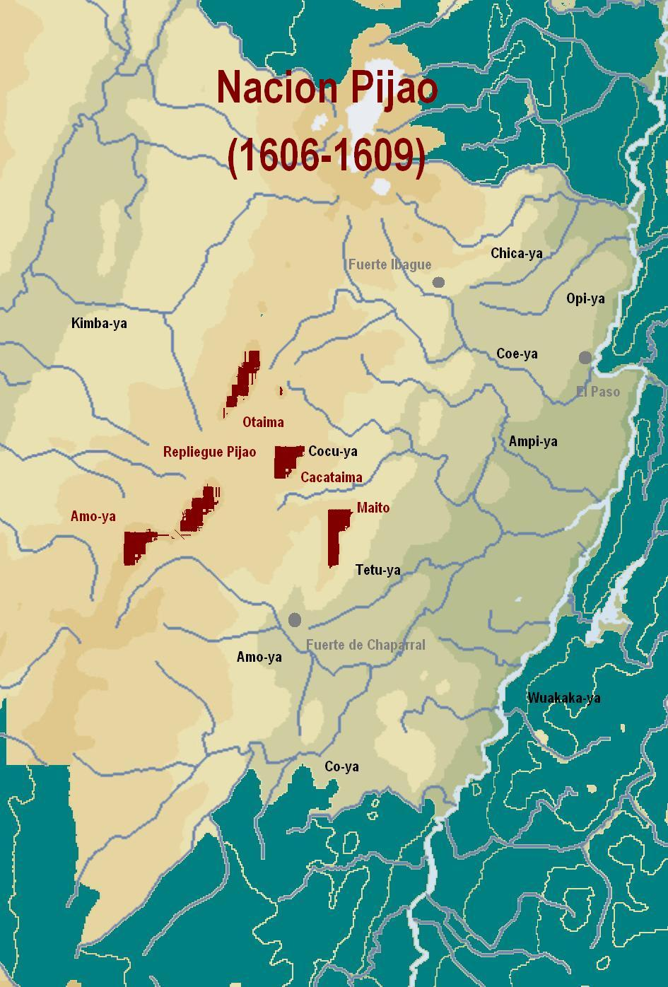 Nacion Pijao (1606-1609)